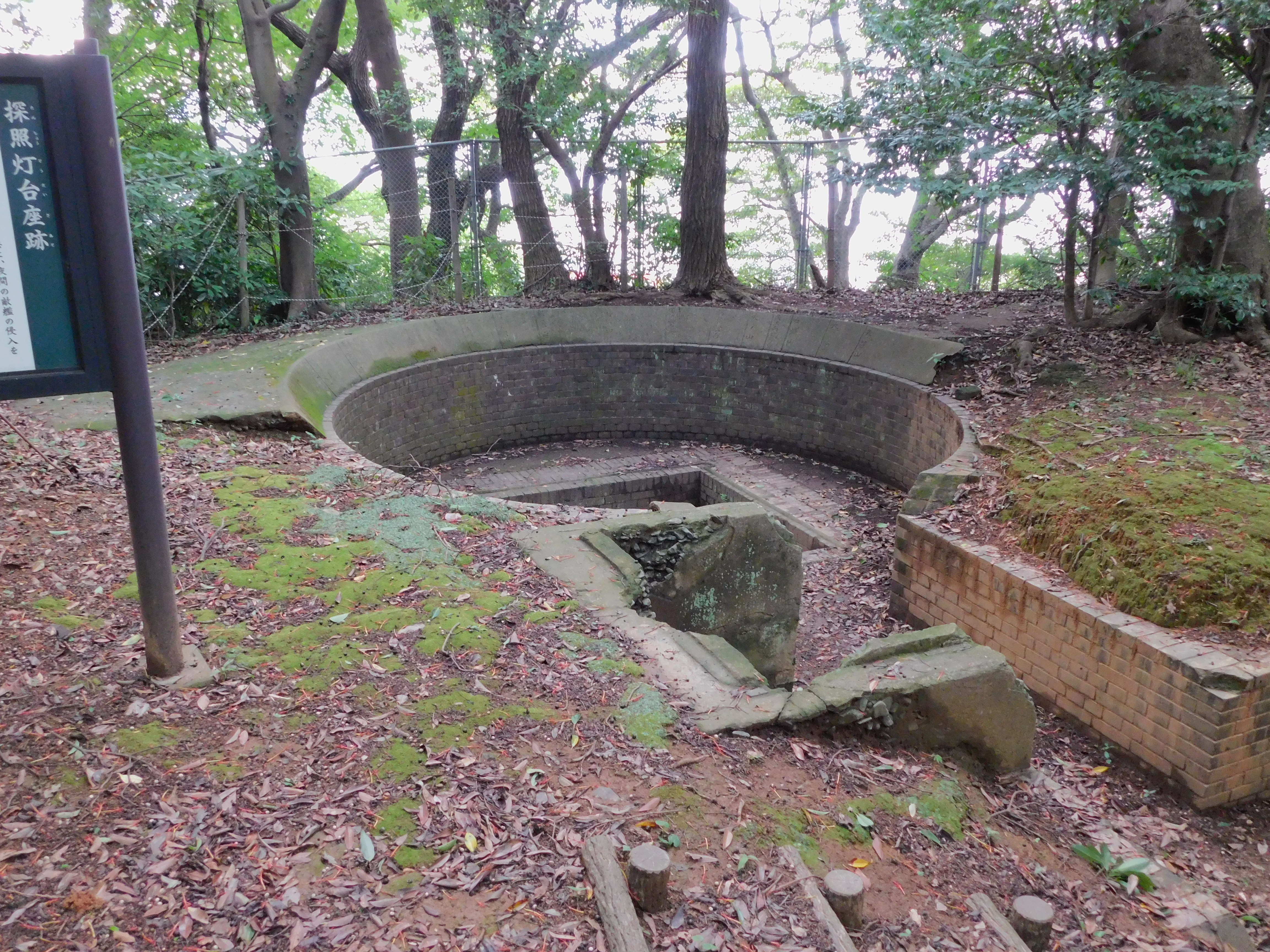 2019年7月24日